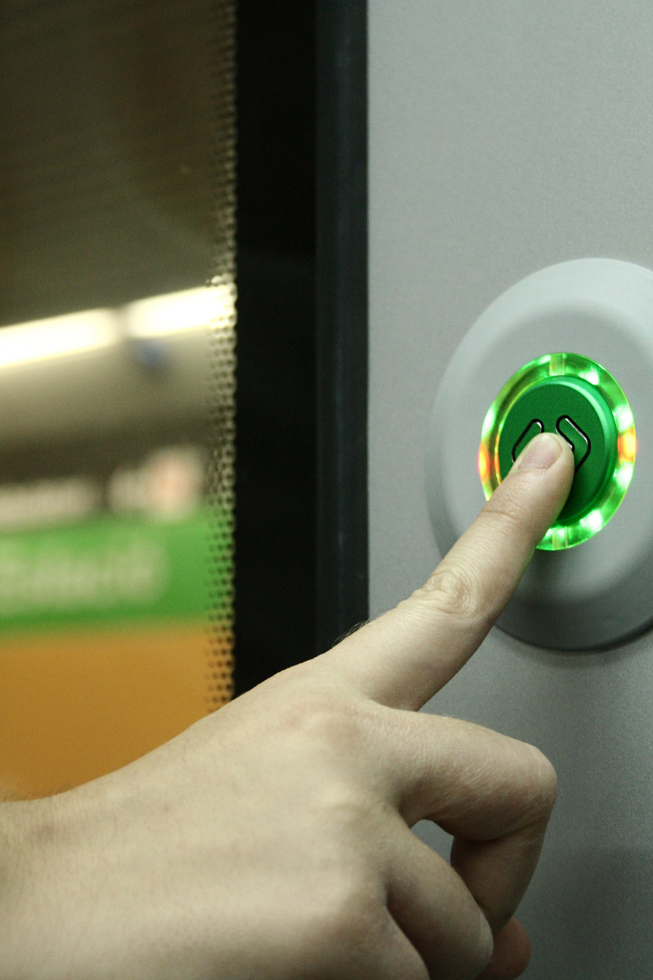 Finger drückt auf Türöffnerknopf